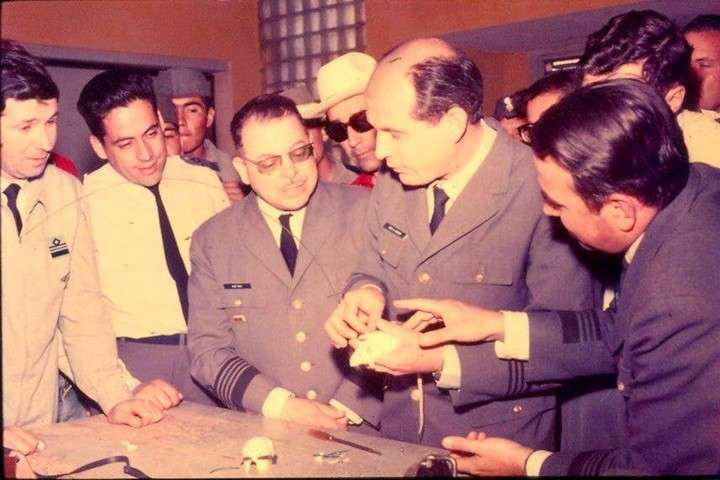 El ingeniero Aldo Zeoli anuncia el experimento a la prensa. Belisario en la mano de otro militar.